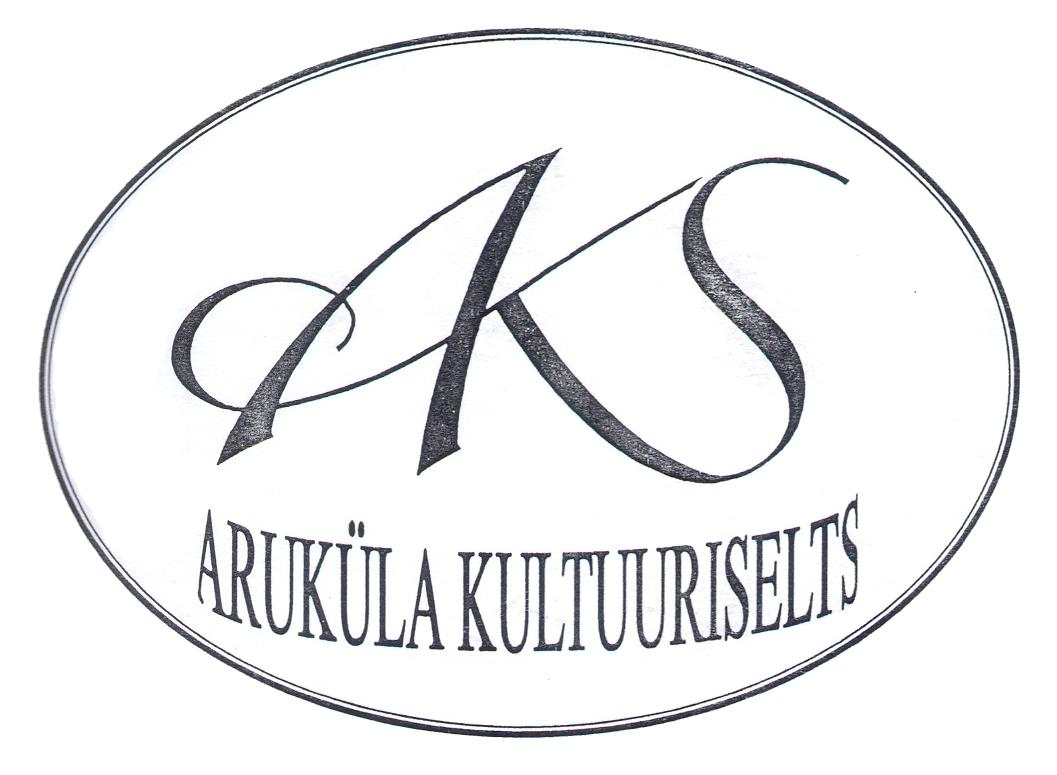 Aruküla kultuuriseltsi logo.